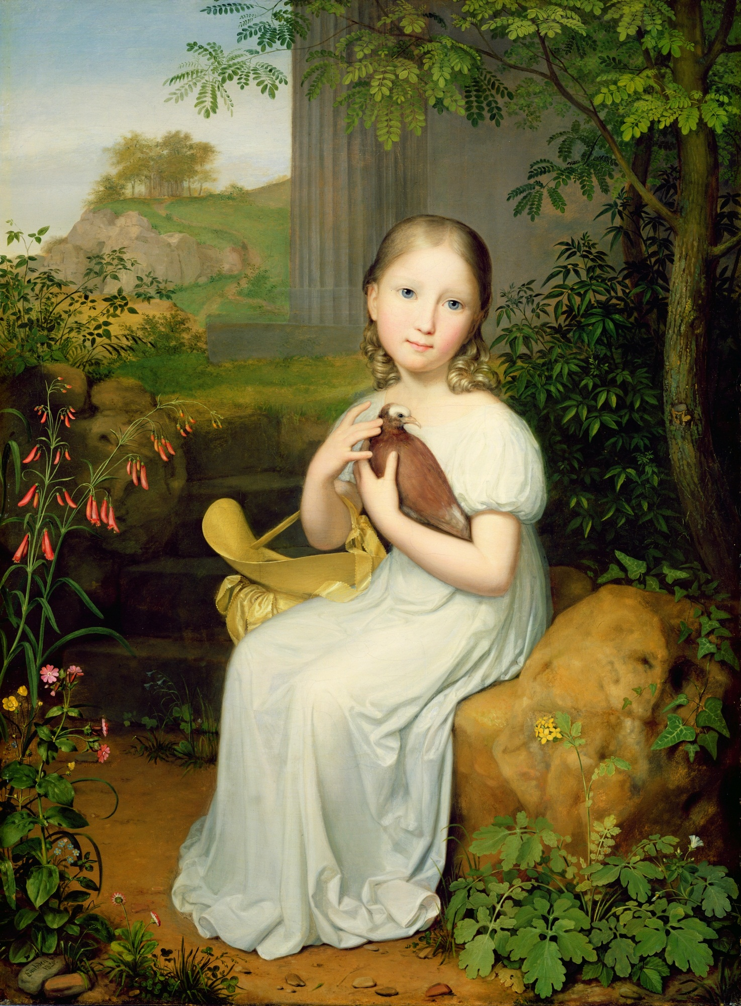 ungefähr im Alter von sieben Jahren